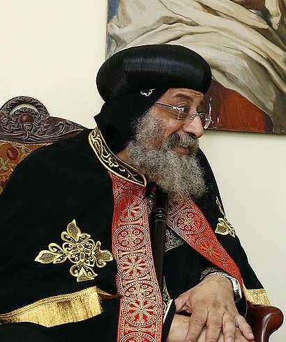 Pope Tawadros II in 2013.